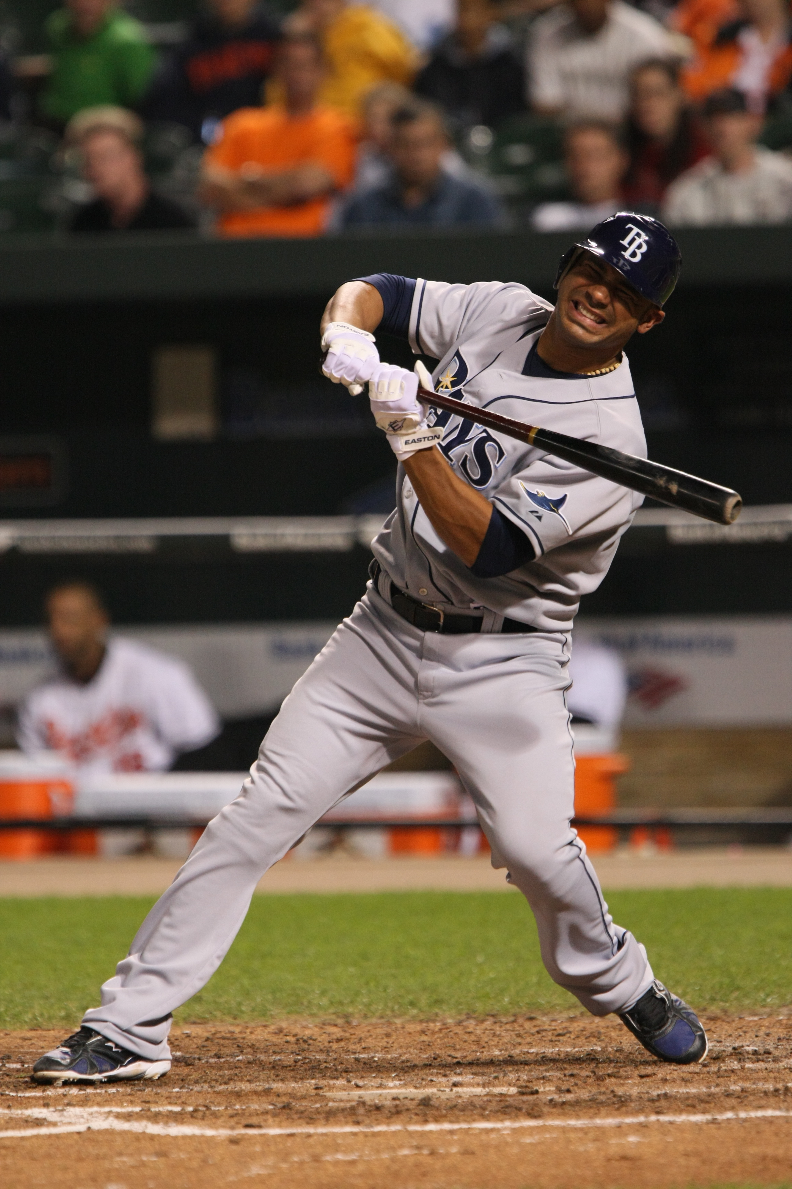 Carlos Peña